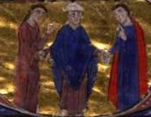 Svatba Sibyly Jeruzalémské a Guye z Lusignanu